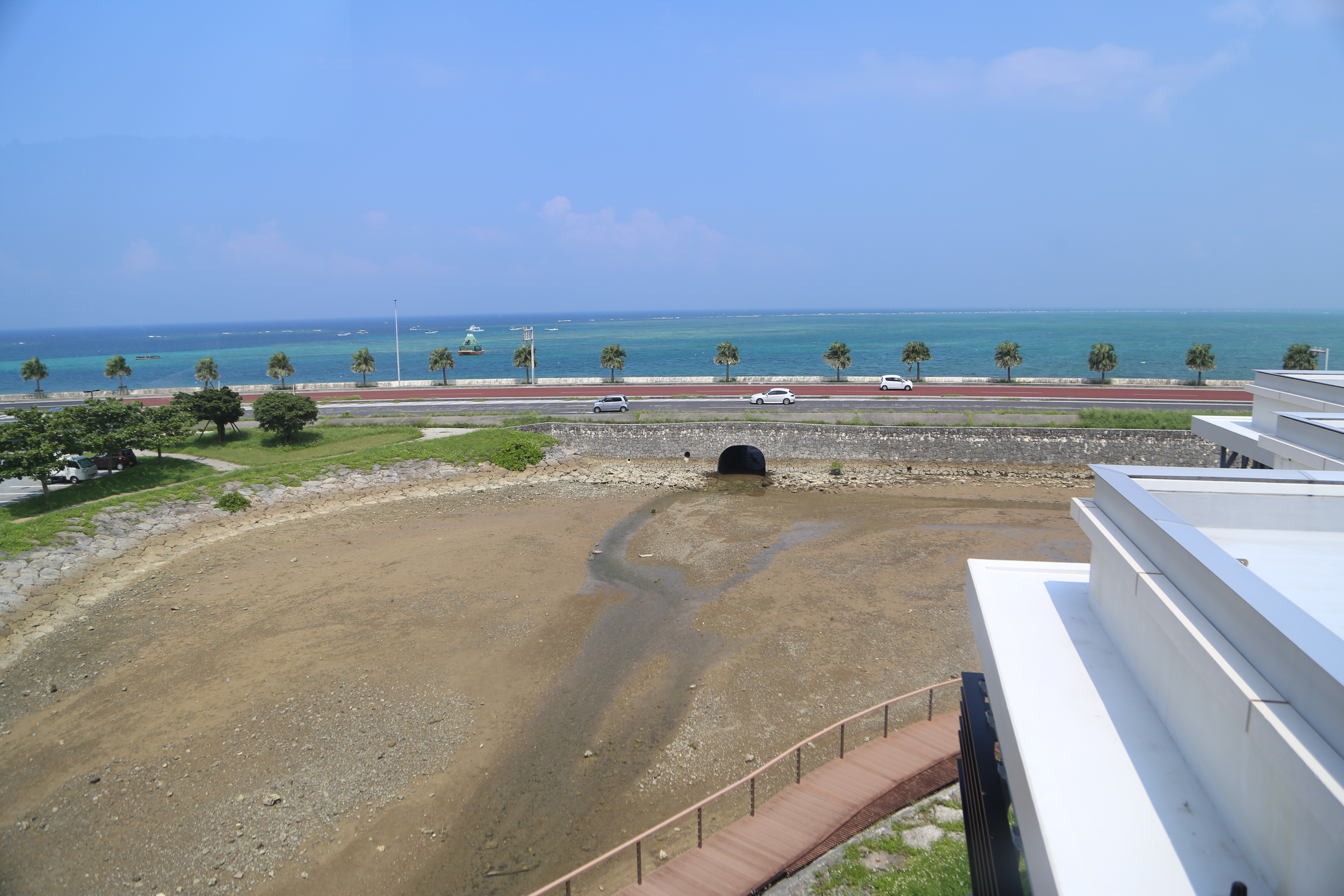 恩納村文化情報センターから国道59号を望む。2019年9月13日撮影。